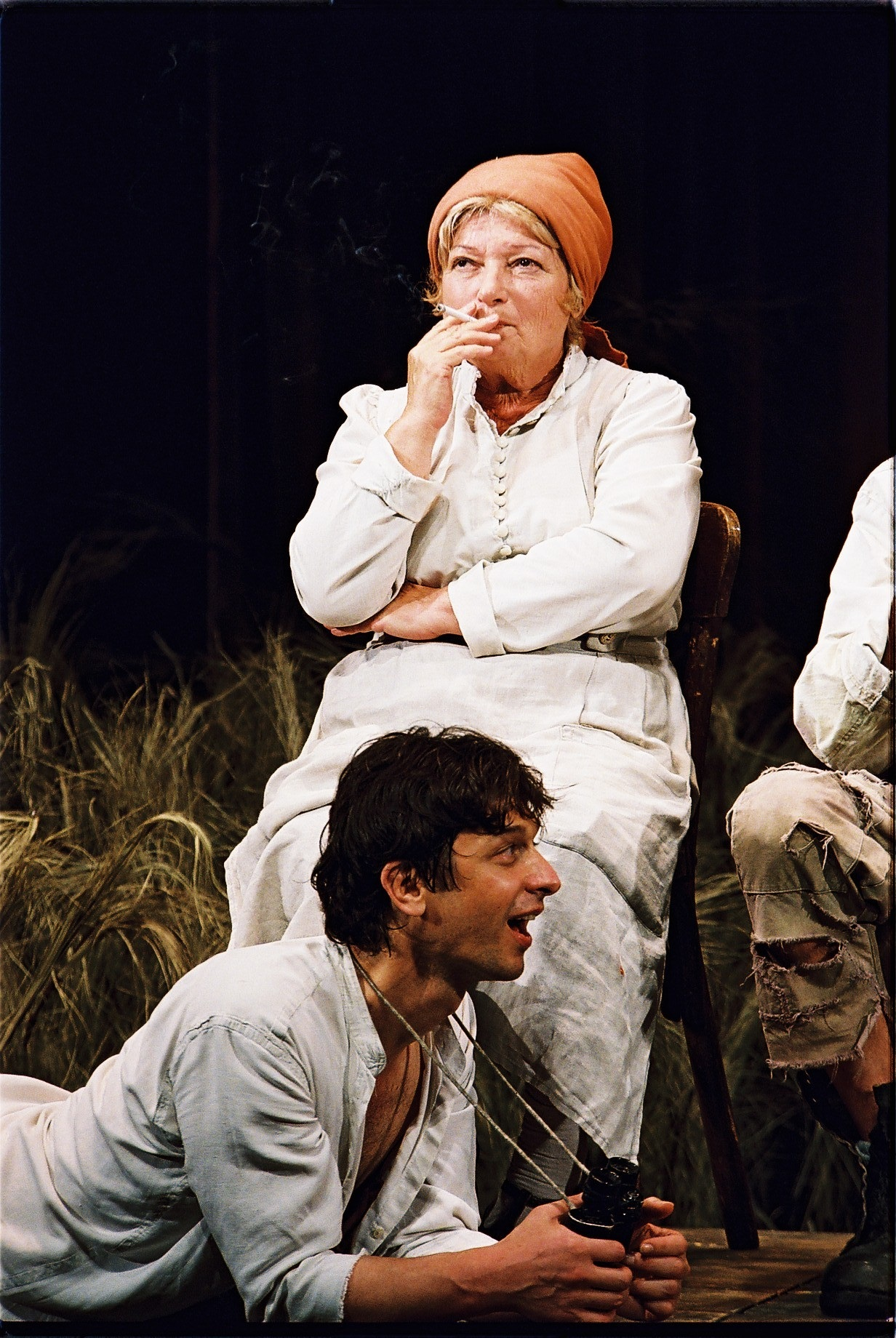 נלי גושבה וסשה דמידוב בהצגה "כפר", תיאטרון גשר